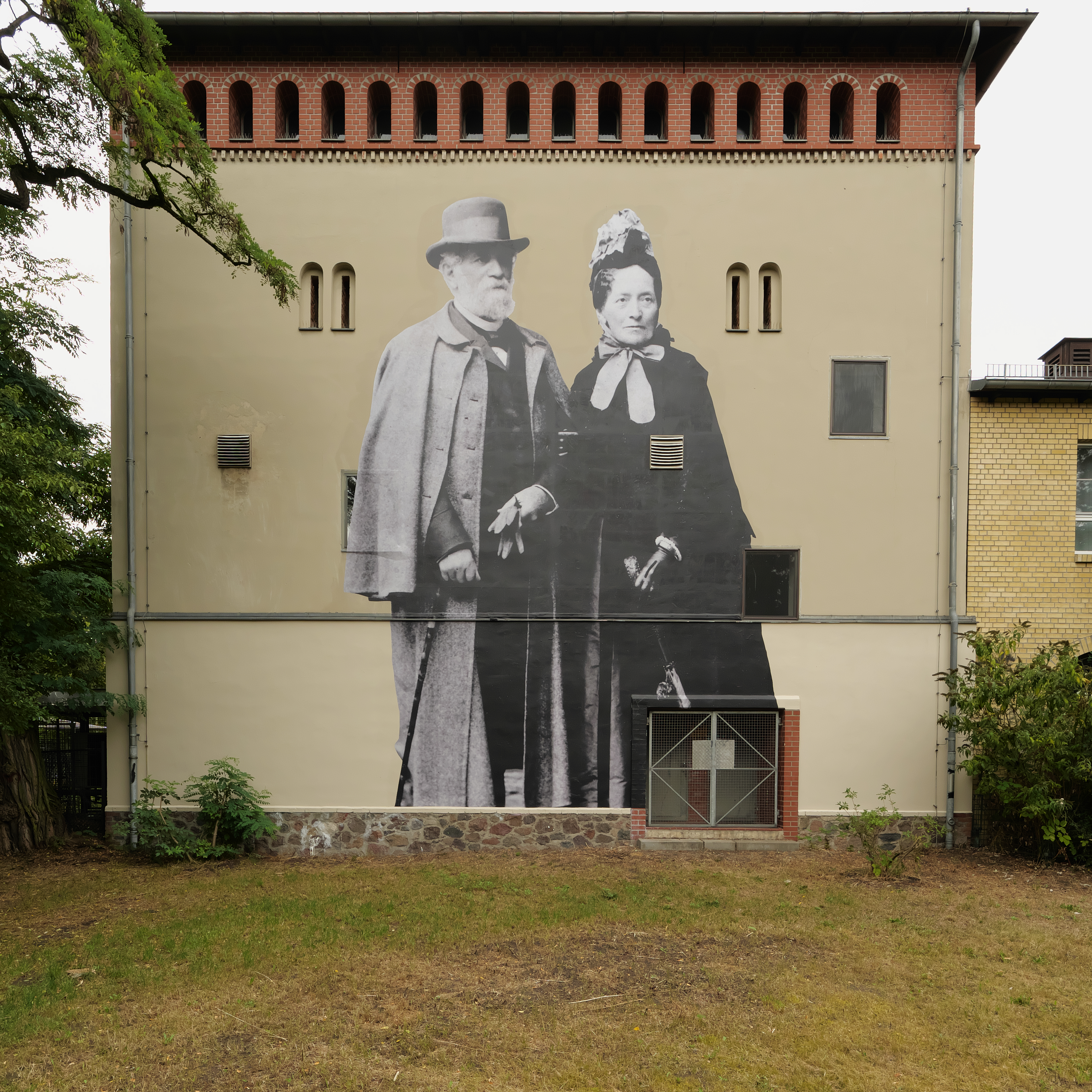 Paste Up History - Marienfelde Goes Street Art, Gutshof Marienfelde, Adolf und Emilie Kiepert